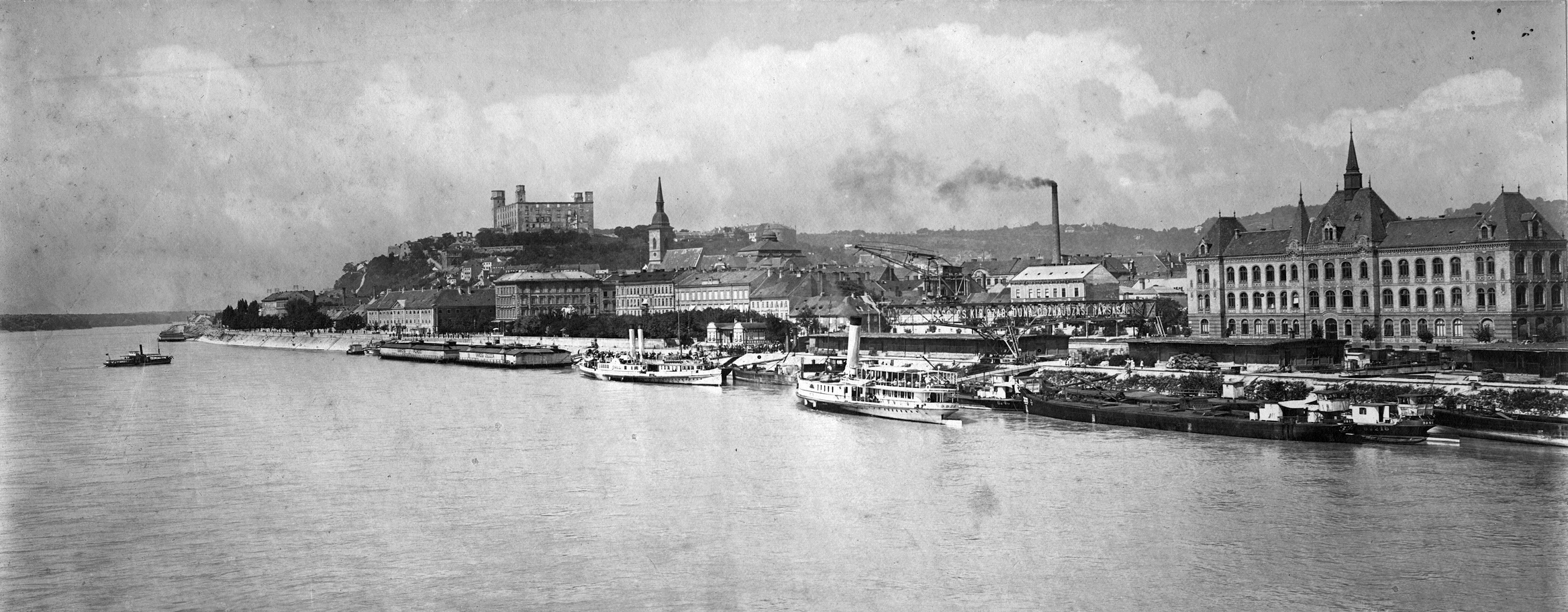 Duna-part. Location: Slovakia, Bratislava Tags: ship, port, chimney, castle, steamboat, barge, Melk/Sophie ship Title: Duna-part.